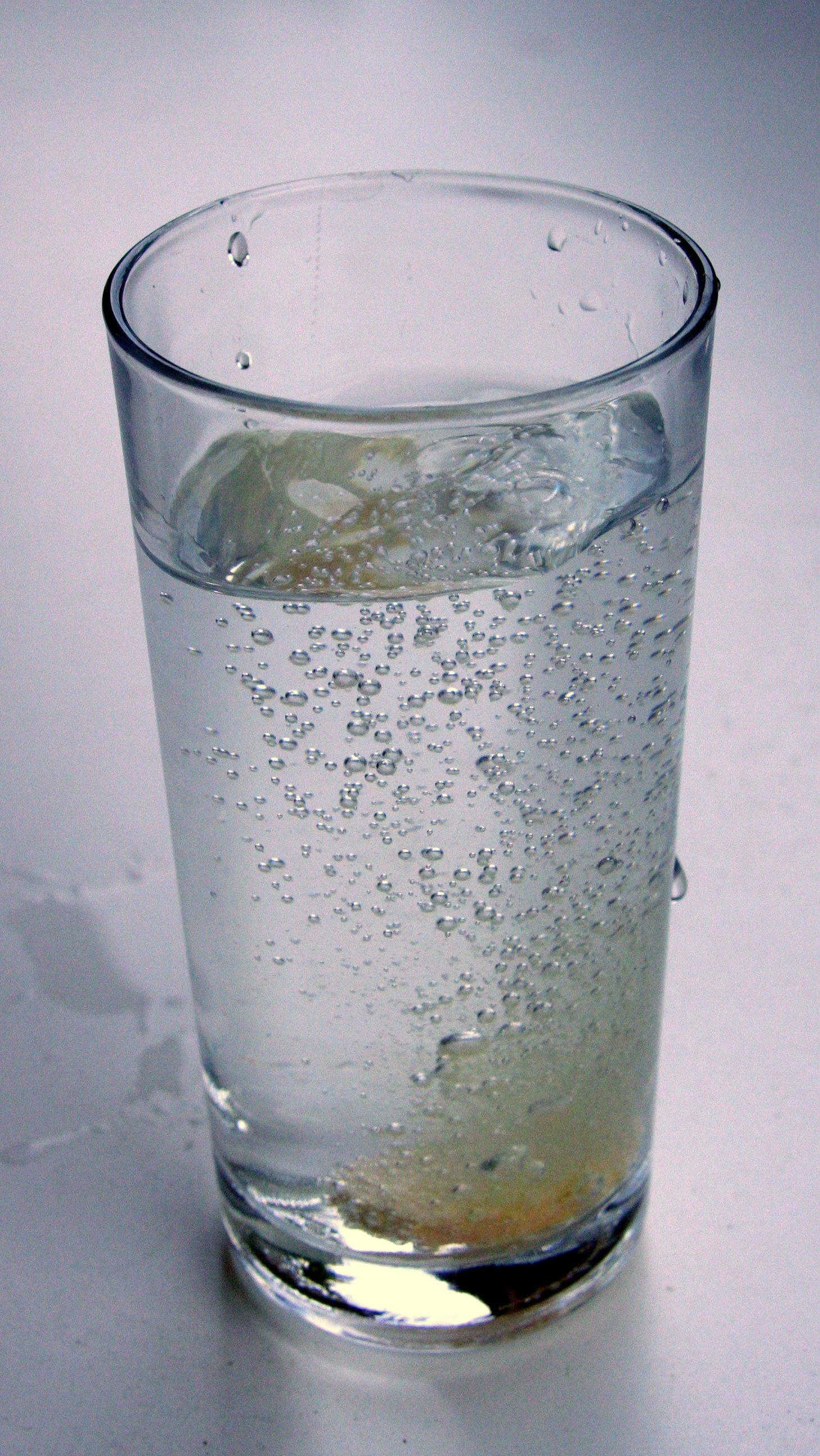 Description